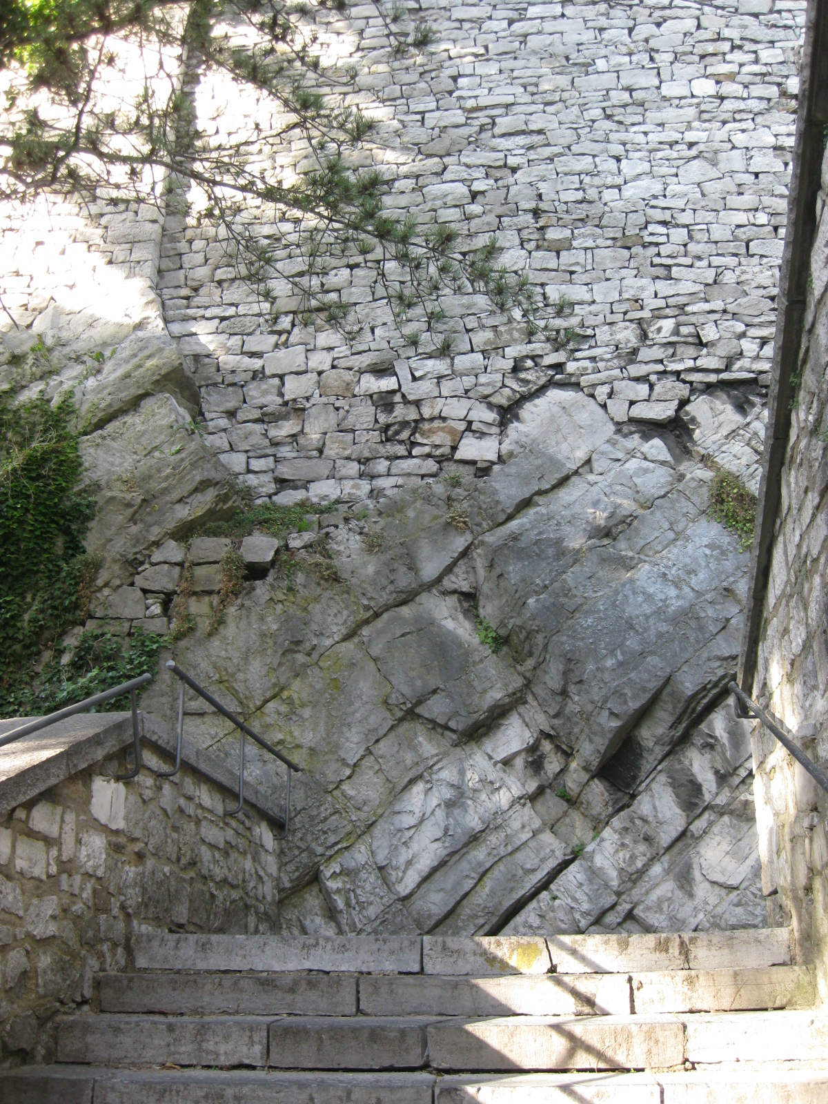 Kalkfelsen im unteren Torbau der Burg Stolberg